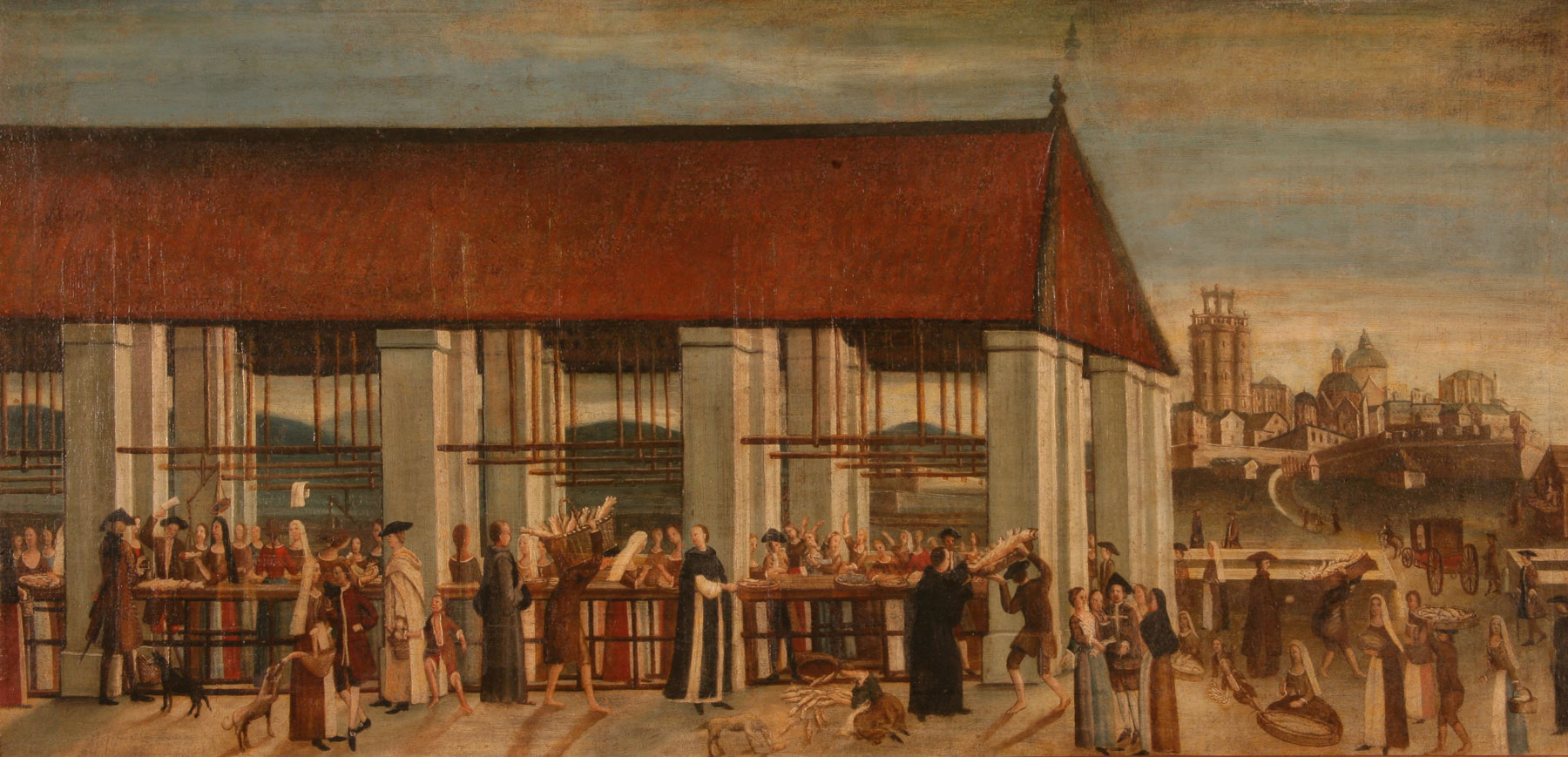 El Bornet de Barcelona, anònim, segle XVIII, Museu d’Història de la Ciutat de Barcelona, al fons es pot apreciar la ciutadella militar. Anònim, segle XVIII, Oli sobre tela, 86 x 164,5 cm, Museu d’Història de la Ciutat de Barcelona, MHCB 10946.